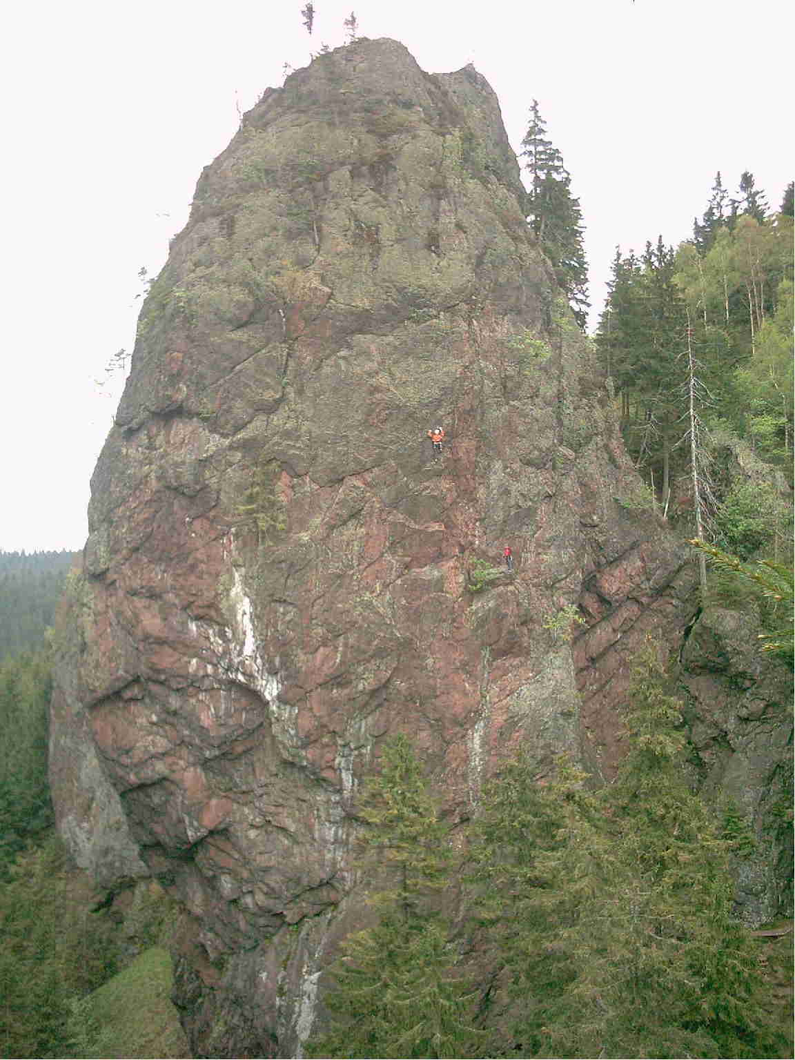 Falkenstein in Thüringen